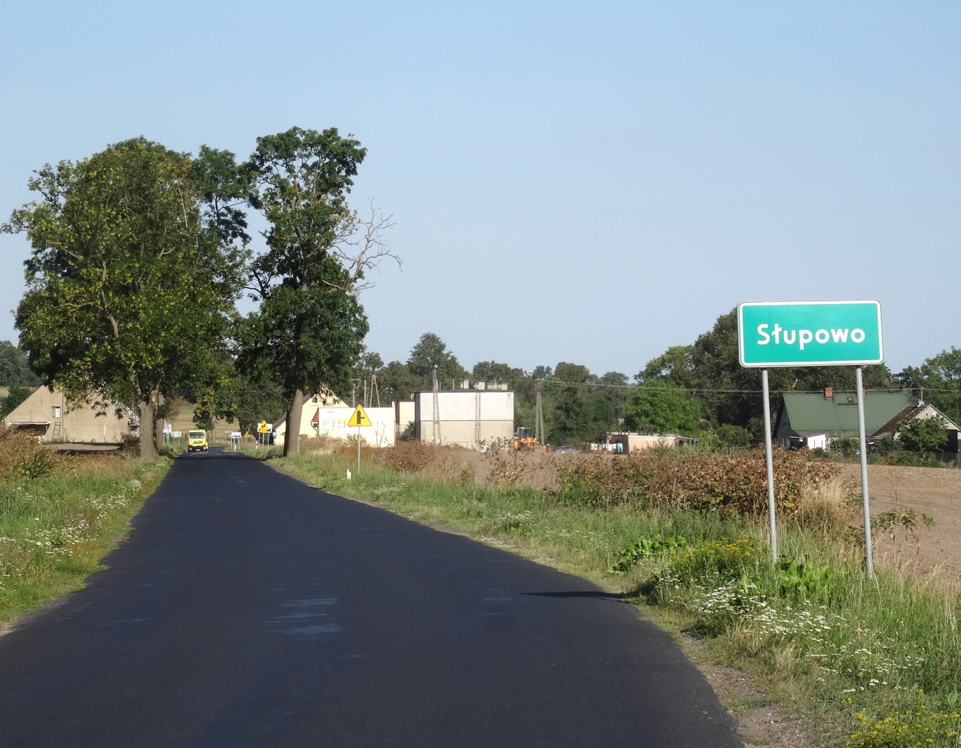 Słupowo, gmina Sicienko, powiat bydgoski